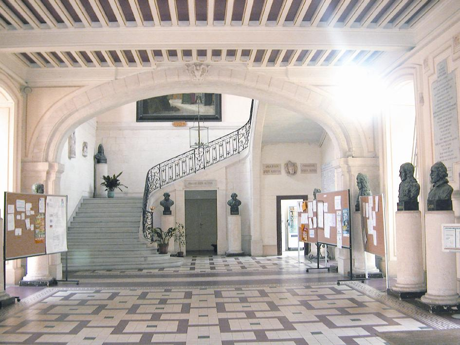 L'Atrium de la Faculté de Médecine de Montpellier Photographie personnelle